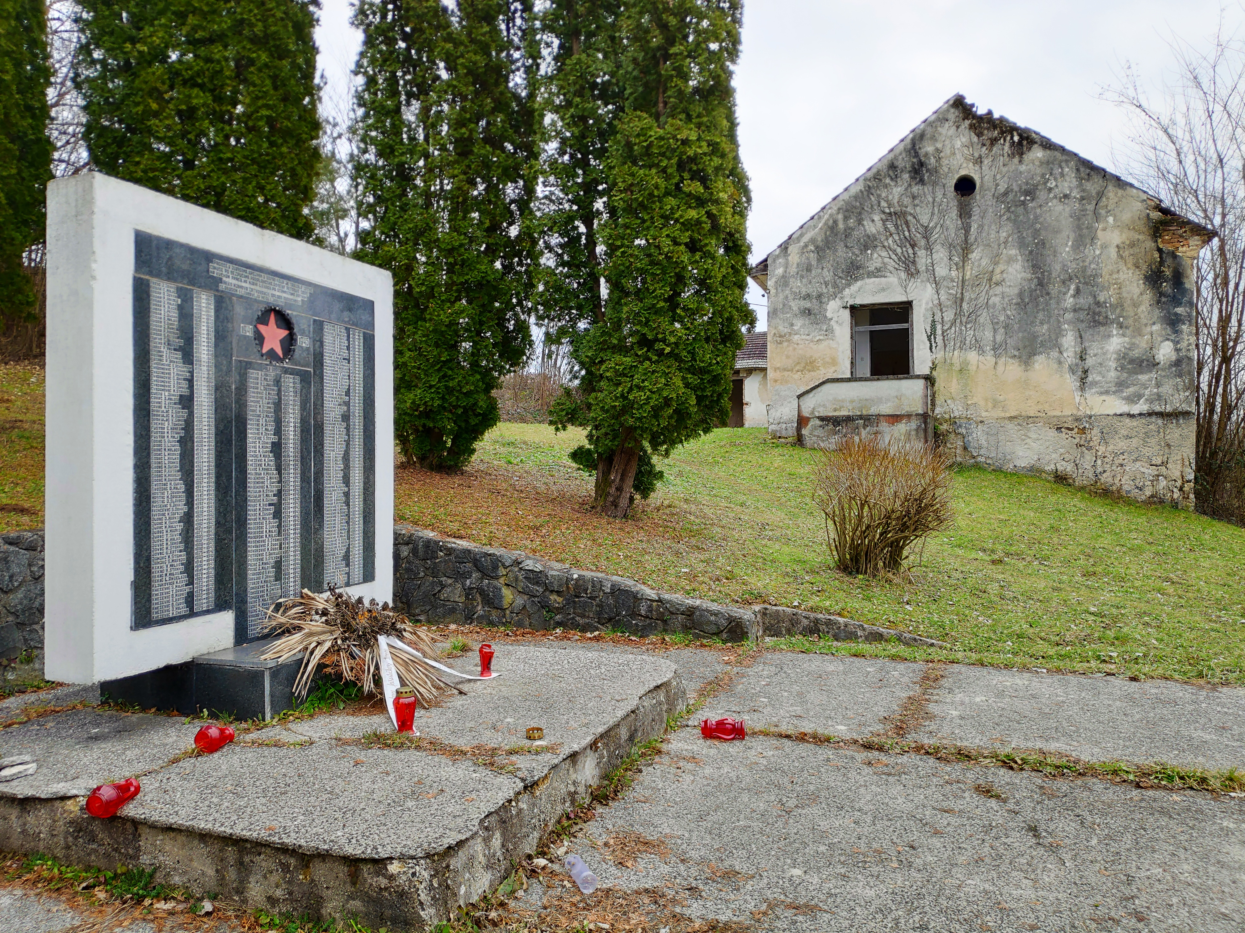 Кнежевић Коса на Кордуну, Хрватска. Лево споменик палим партизанима из другог светског рата, десно се налази напуштена 4-годишња основна школа, која је напуштена веч за време Југославије. Село је и након рата са великом вечином српске популације.